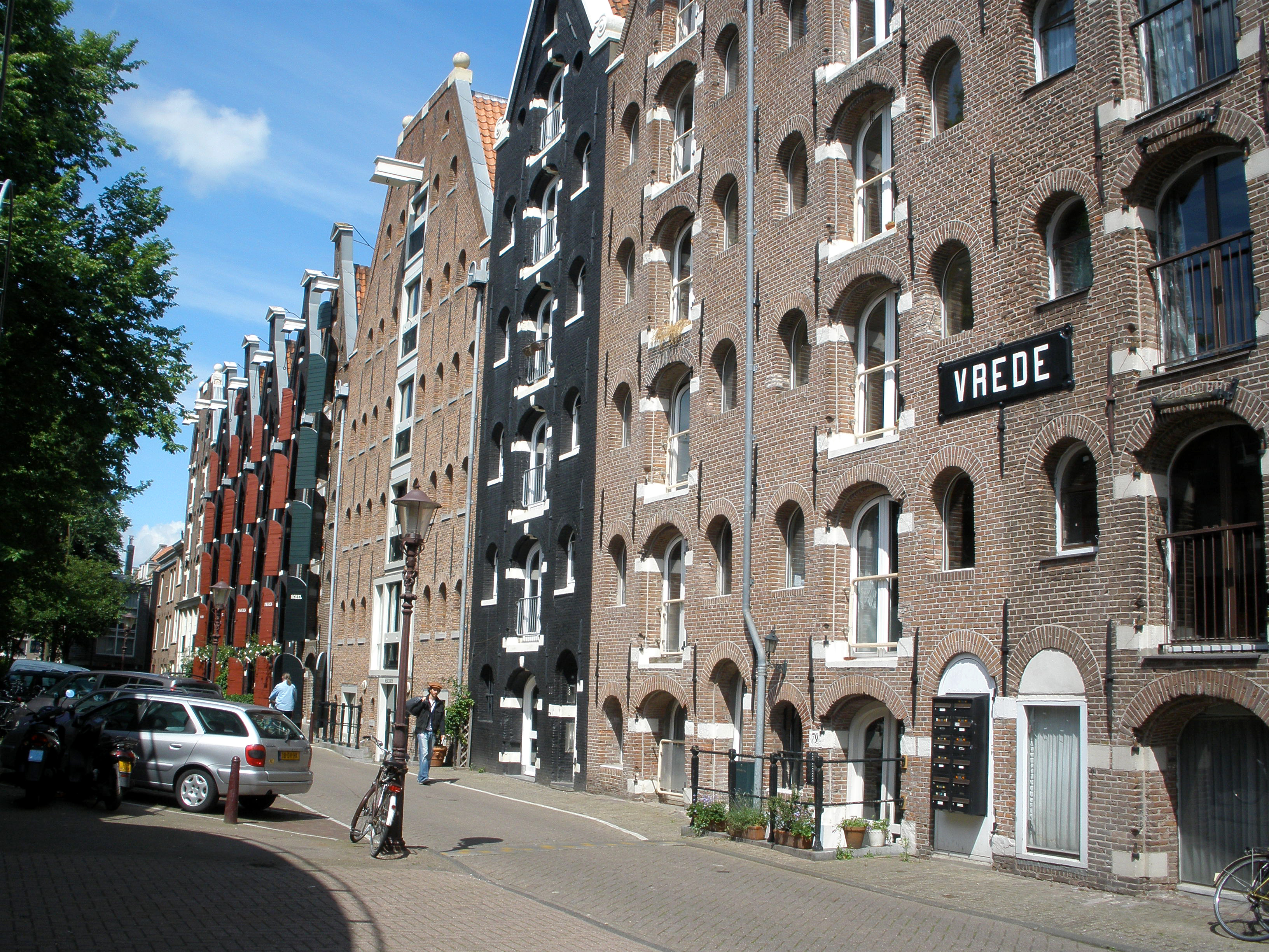 Prinseneiland ("Prince's Island") in Amsterdam.